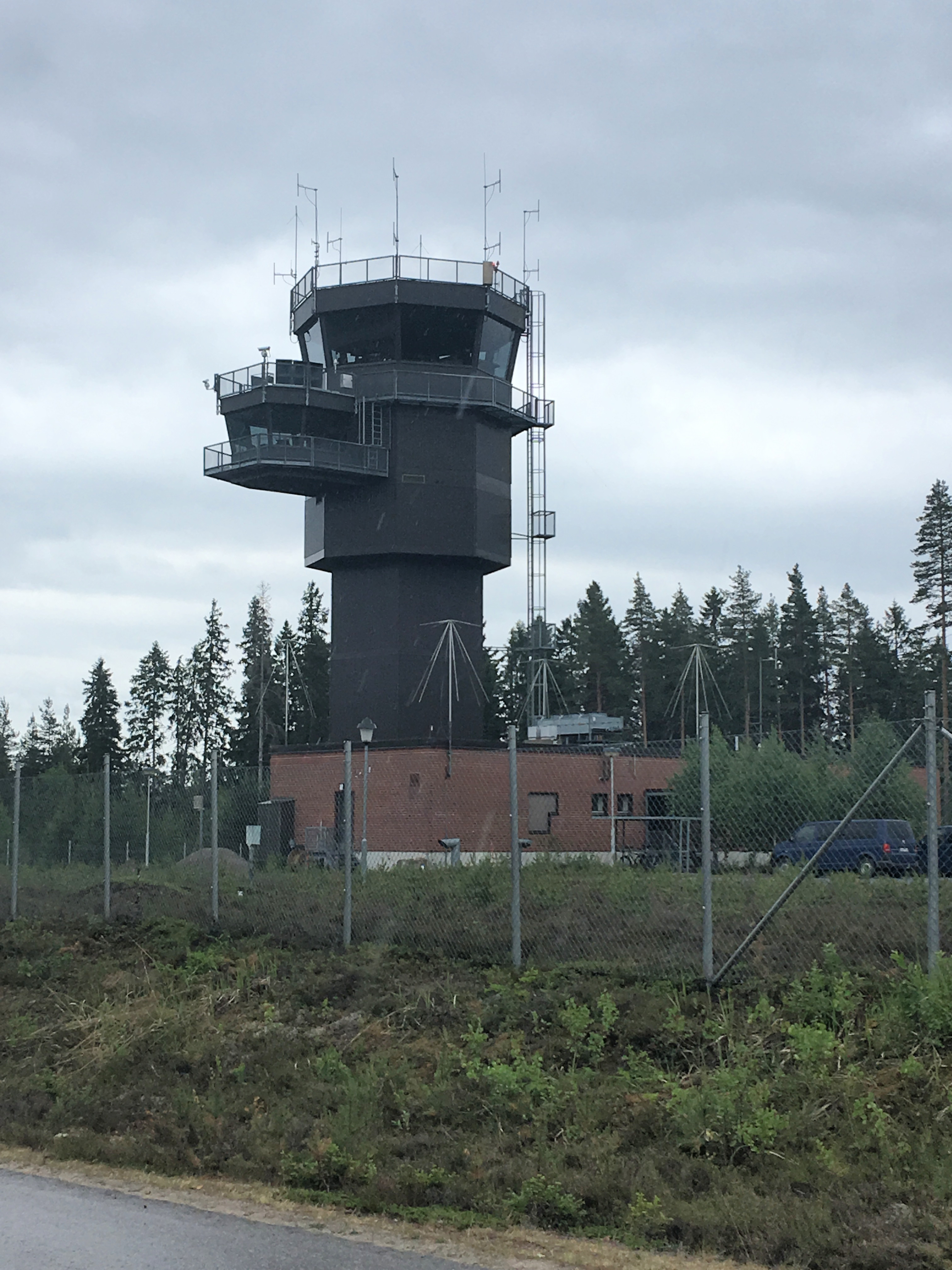 Hallin lentoaseman lennonjohtotorni.